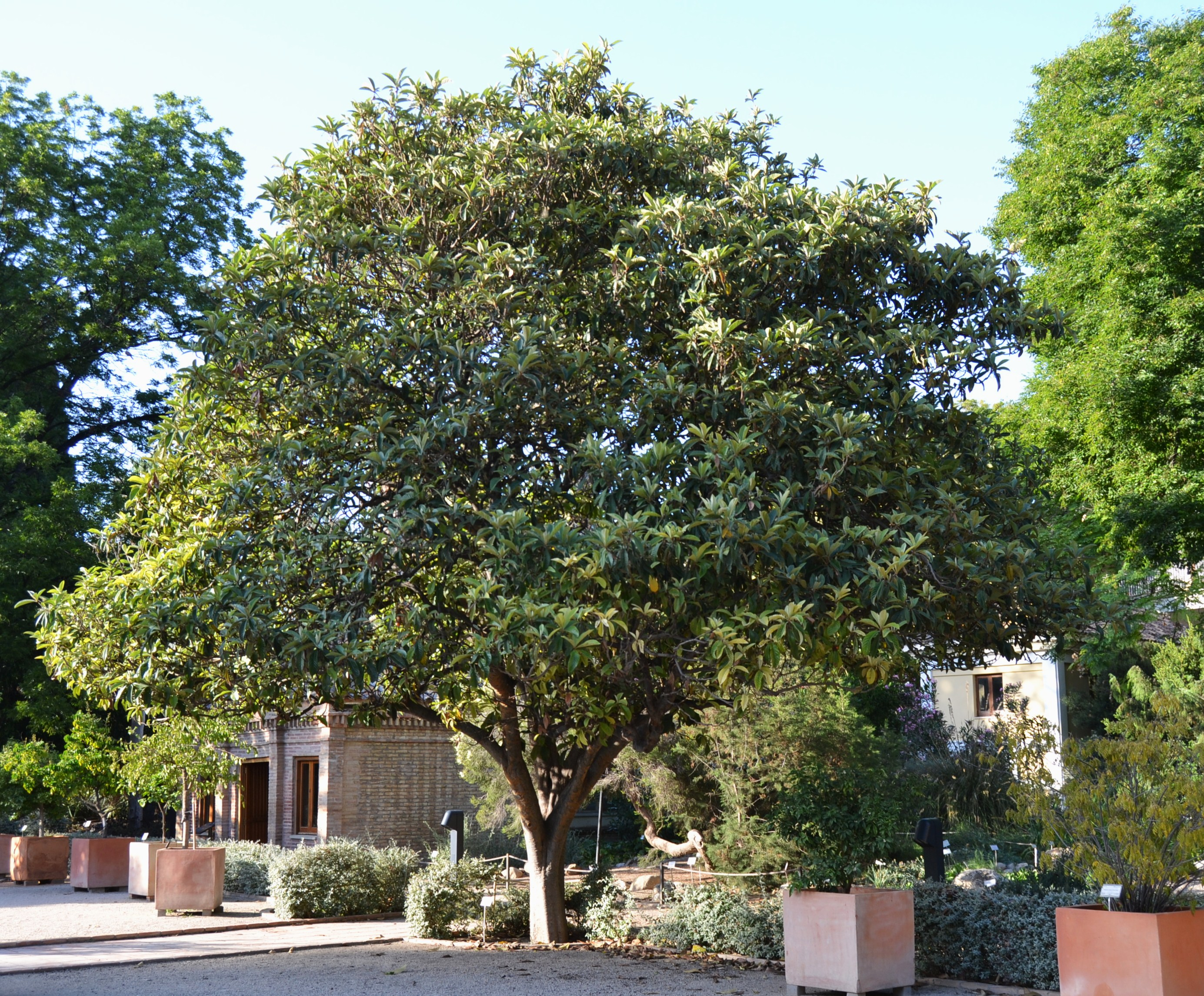 Nesprer del Japó (Eriobotrya japonica), jardí botànic de València.